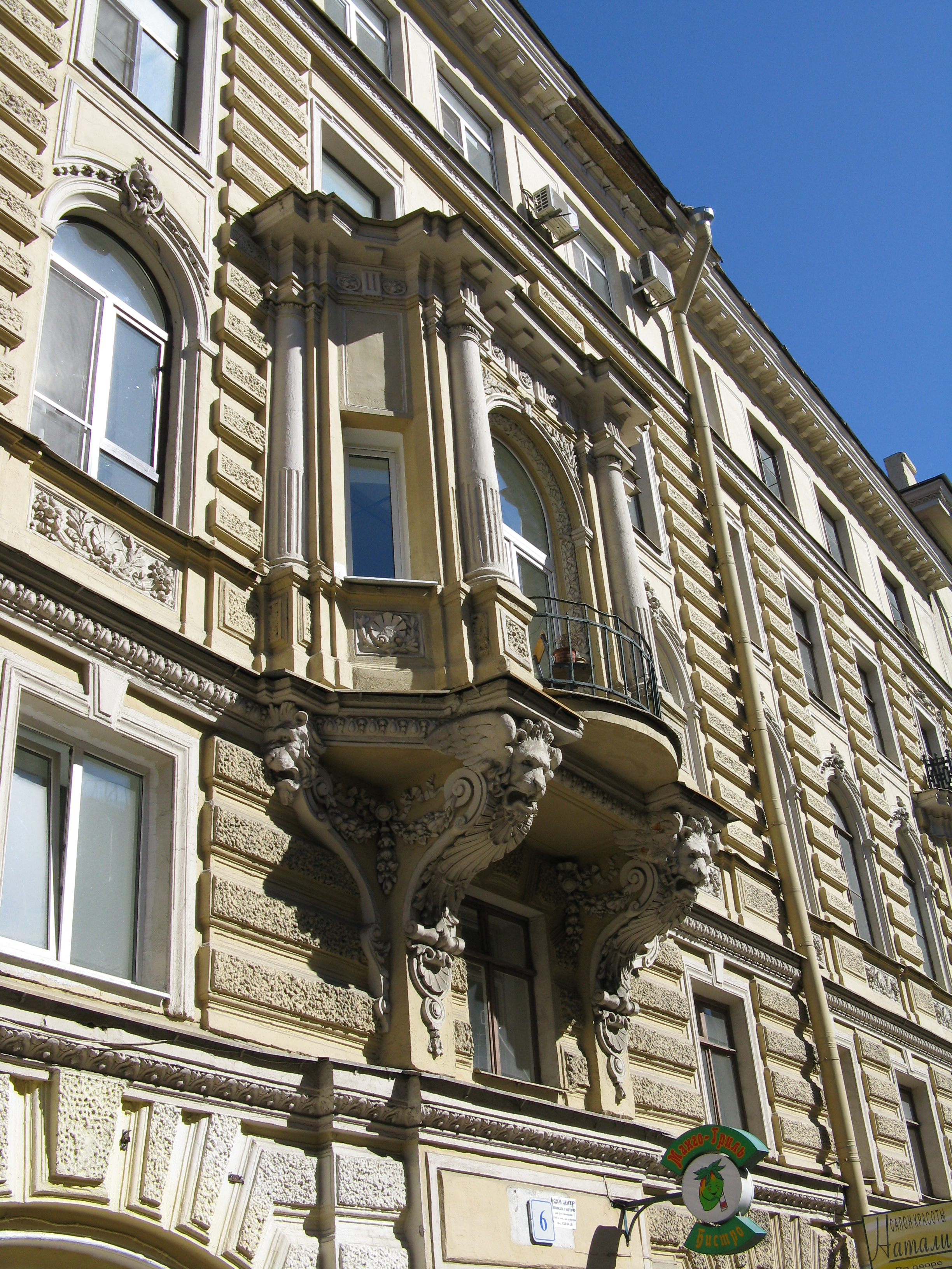 Sredniy avenue, 40, St-Petersburg